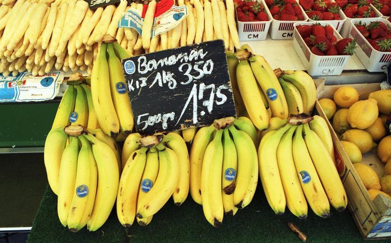 Juni 1988 Bonn, Wochenmarkt - Obst und Gemüsestände auf dem Marktplatz